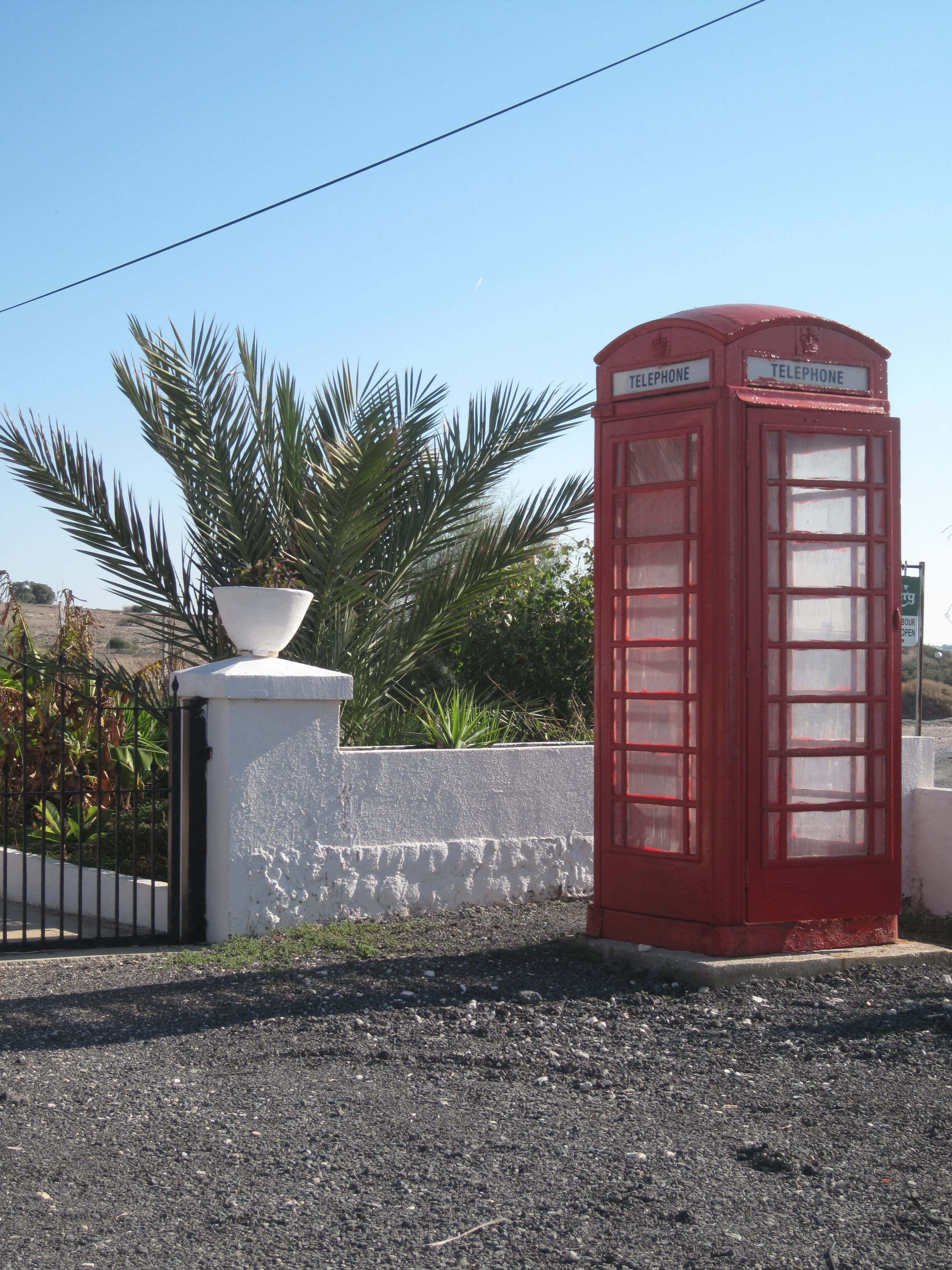 britse telefooncel op Cyprus